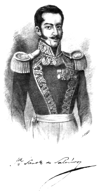 Felipe Santiago Salaverry, Jefe Supremo del Perú de 1835 a 1836.